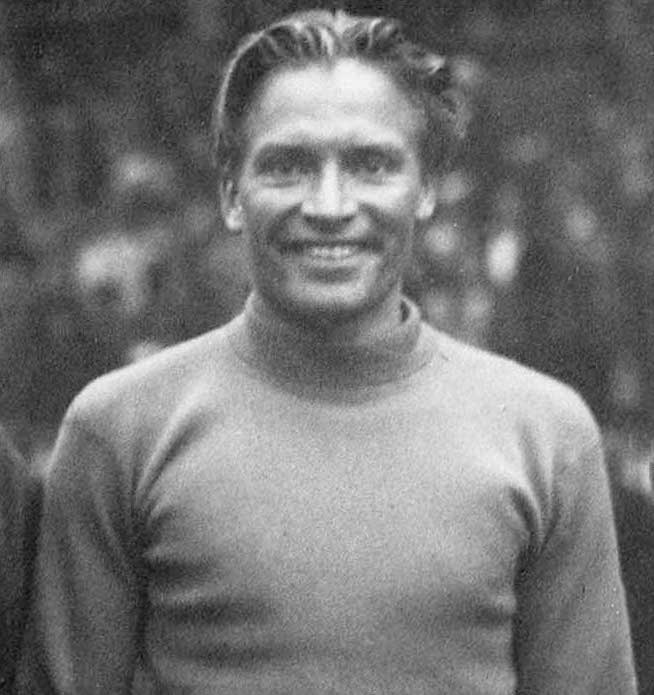 Eric Ny